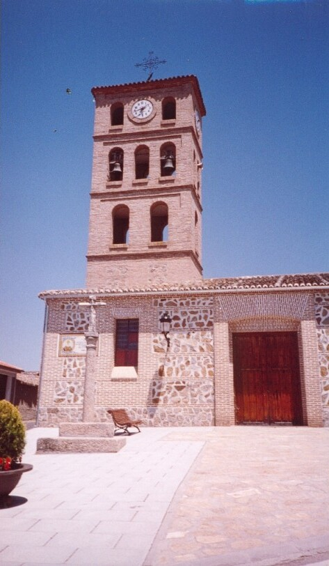 Alcolea de Tajo, foto de Javier Gil Alcolea de Tajo